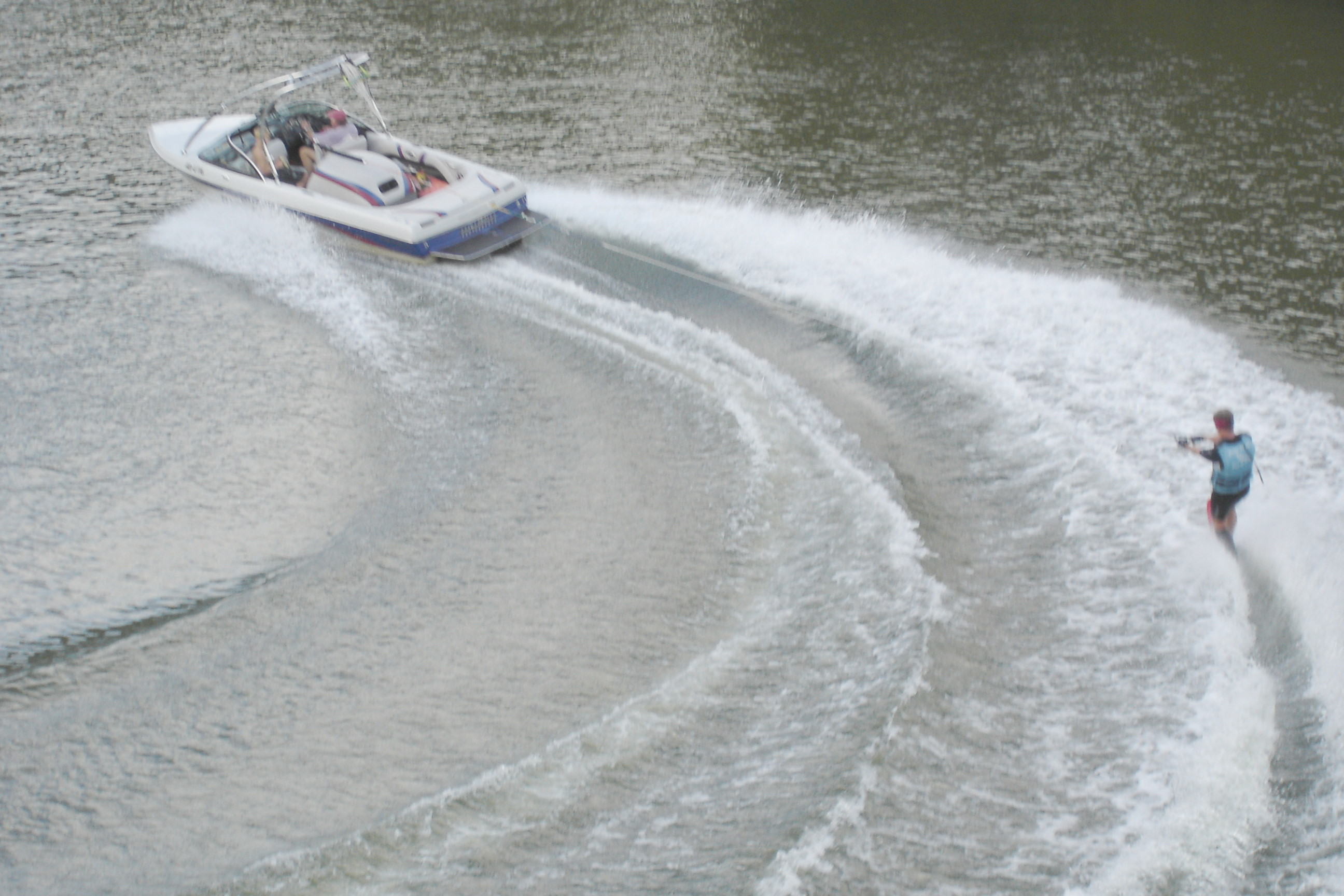 Wasserskiläufer hinter Motorboot